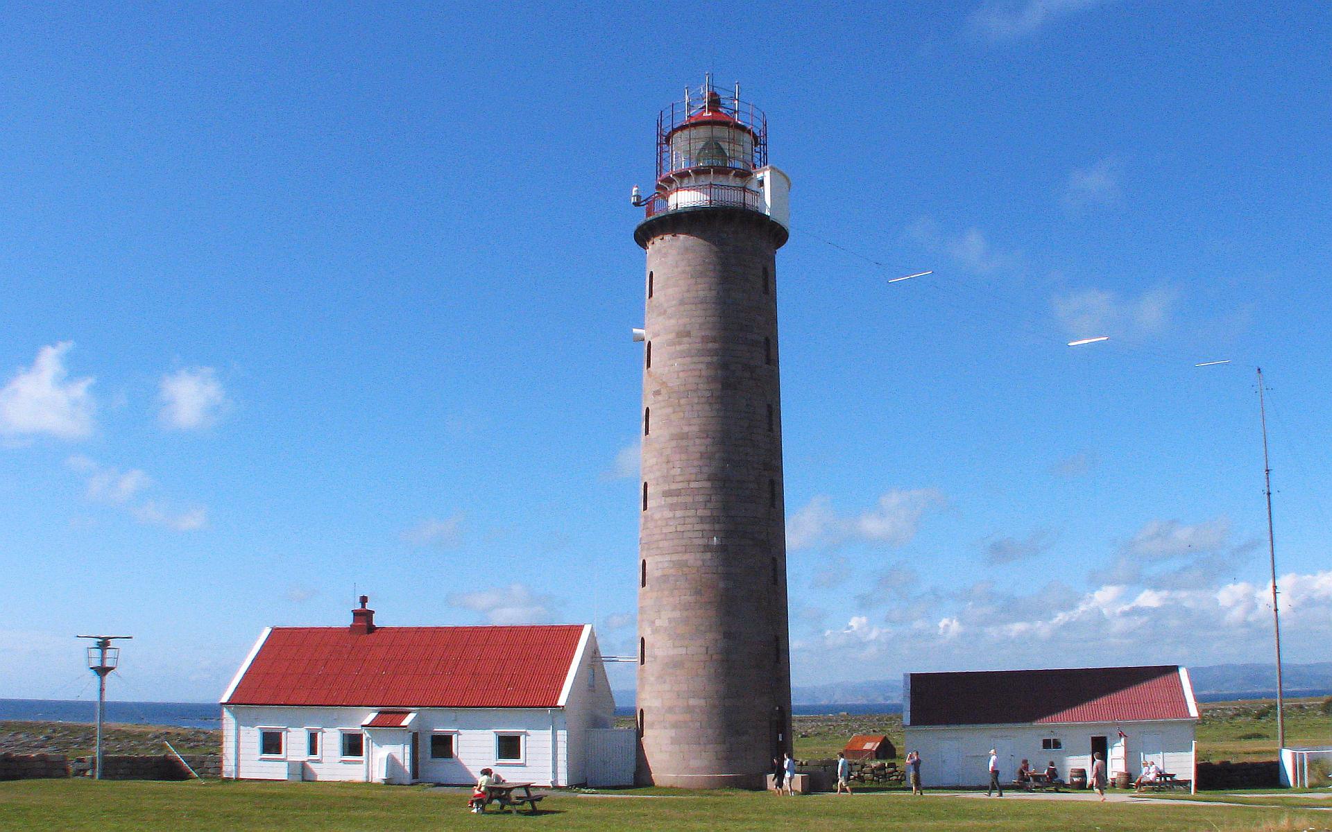 Lista Fyr Leuchtturm 1836 Denkmalschutz Bauwerkshöhe 34 westlich Farsund lufthavn und nordwestlich Vestbygd Norwegen Foto Wolfgang Pehlemann IMG_1227